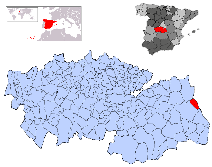 Cabezamesada en la provincia de Toledo